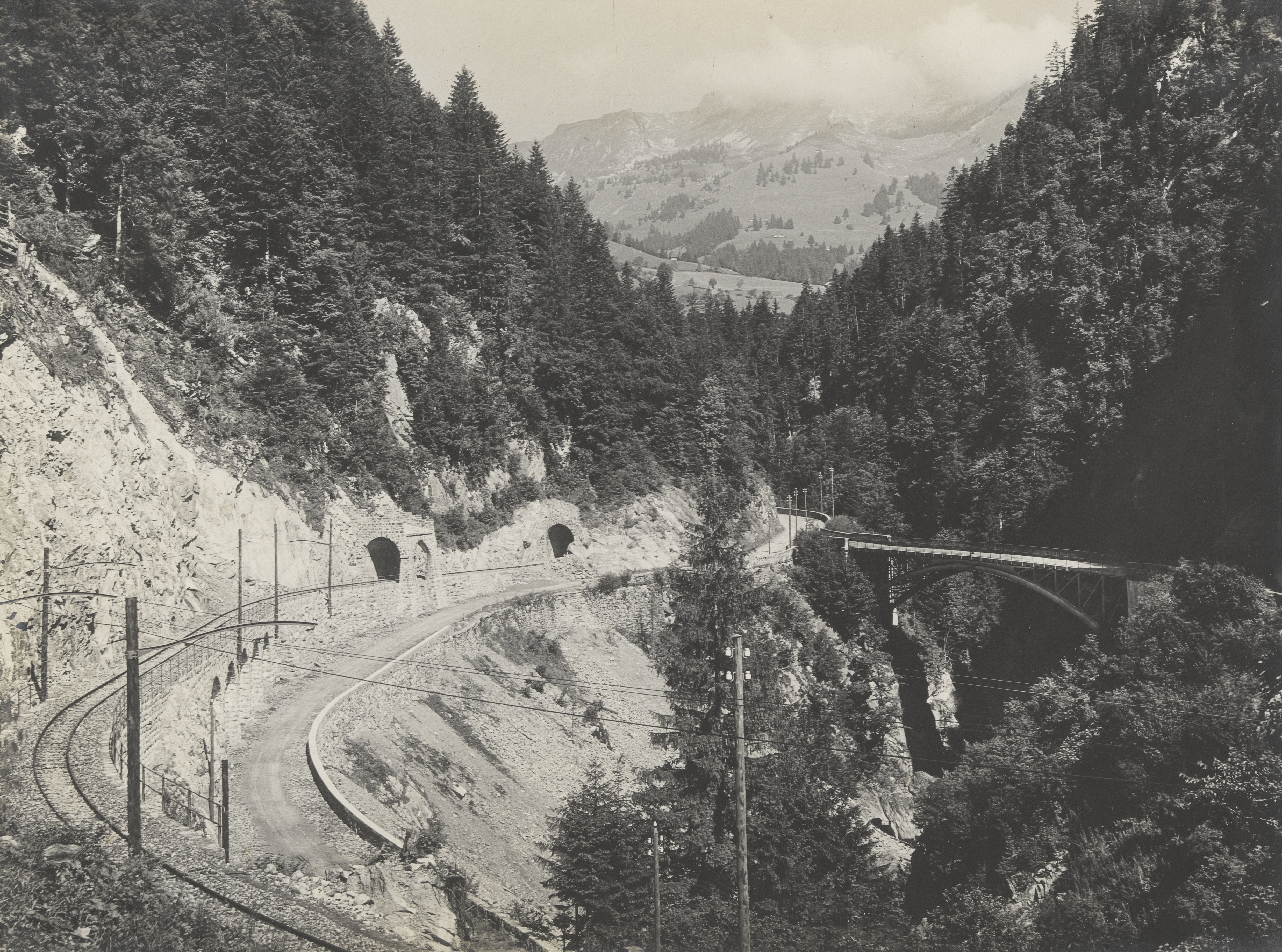 Galerie de La Tine MOB 1909, Rossinère VD, Schweiz